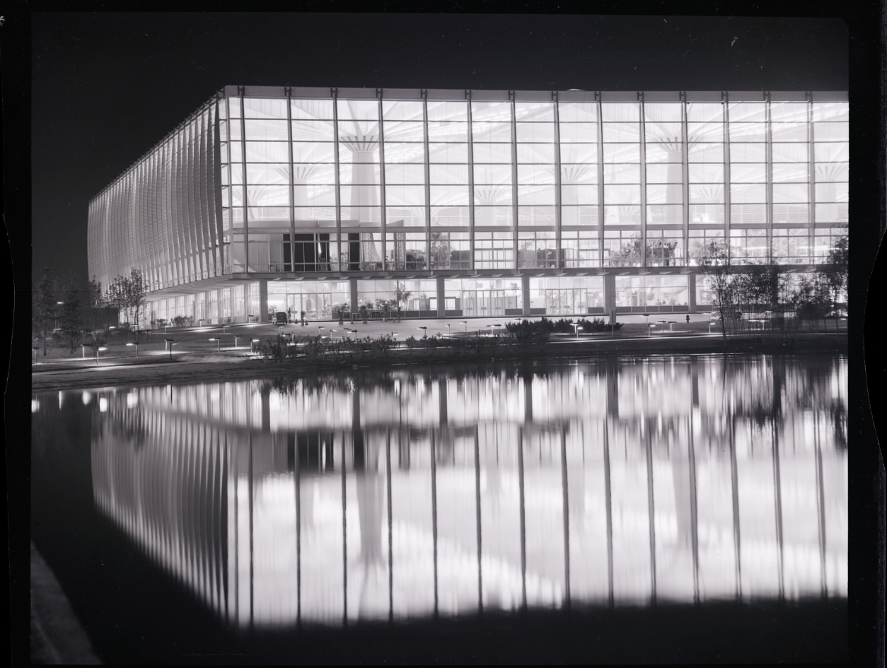 Servizio fotografico : Torino, 1961 / Paolo Monti. - Buste: 4, Fototipi: 4 : Negativo b/n, gelatina bromuro d'argento/ pellicola ; 10x12. - ((Serie costituita da 4 negativi identificati con i nn.: 22975, 22994, 23011, 23094. Altra numerazione parallela: 38899, 38914, 38936, 39035. La suddetta serie è contenuta nella scatola identificata con la numerazione 23201-23500. - Occasione: Documentazione dell'esposizione internazionale Italia '61 tenutasi a Torino in occasione del centenario dell'unità d'Italia. - Fonte: Rubrica di Paolo Monti: Archivio 10x12 (ultimi numerati) - dal G1 al (s.d.), presso Archivio Paolo Monti